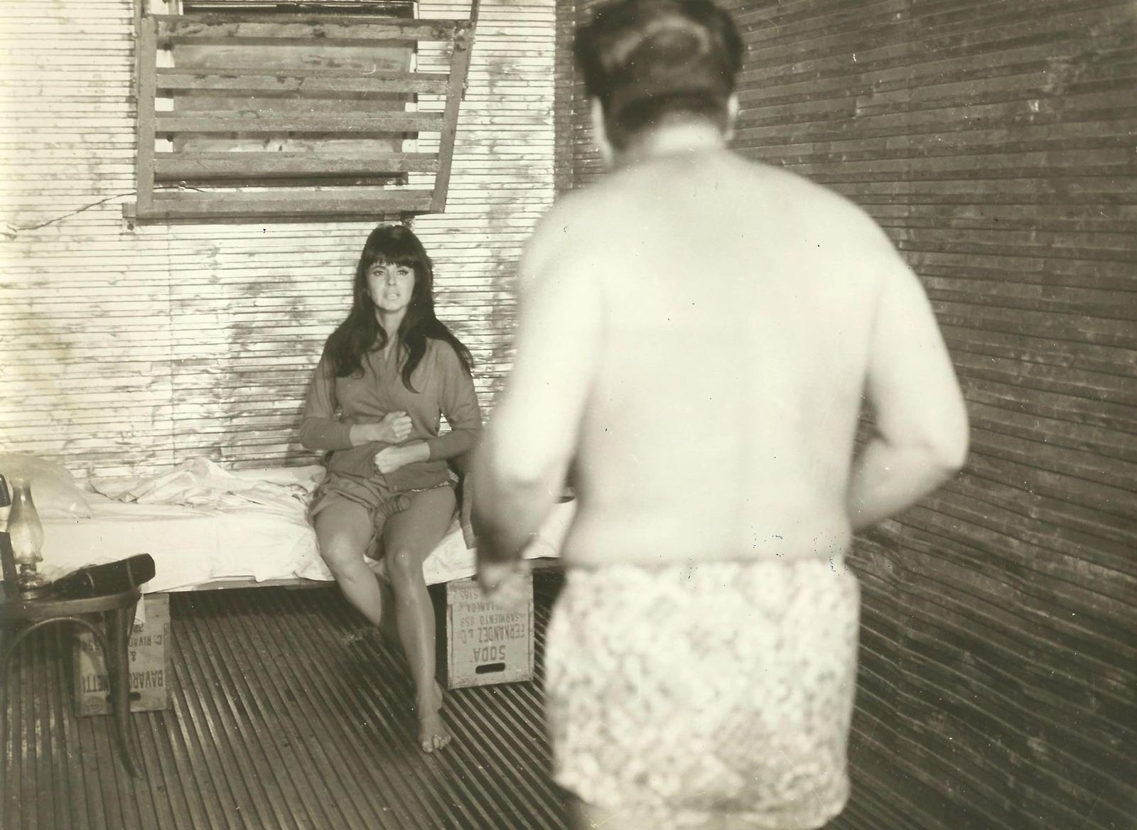 Isabel Sarli en Carne, película de 1968.